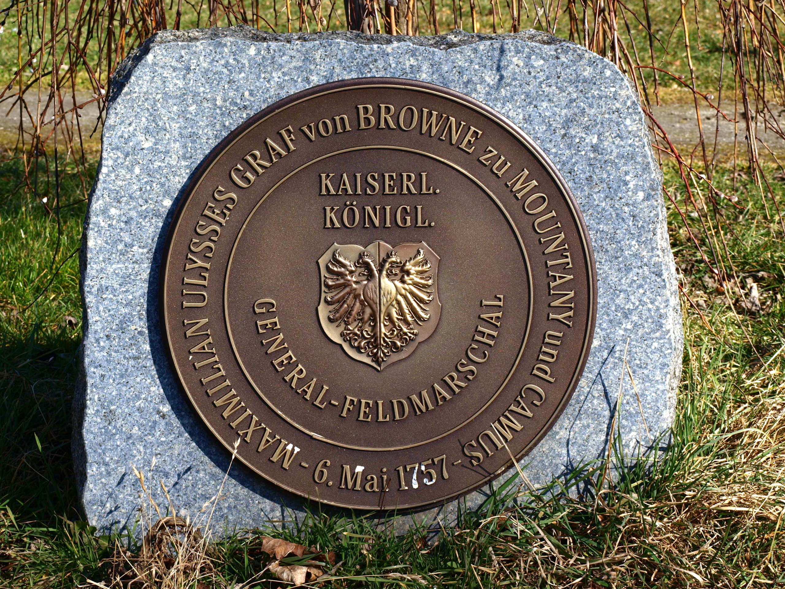 Štěrboholy Pamětní deska